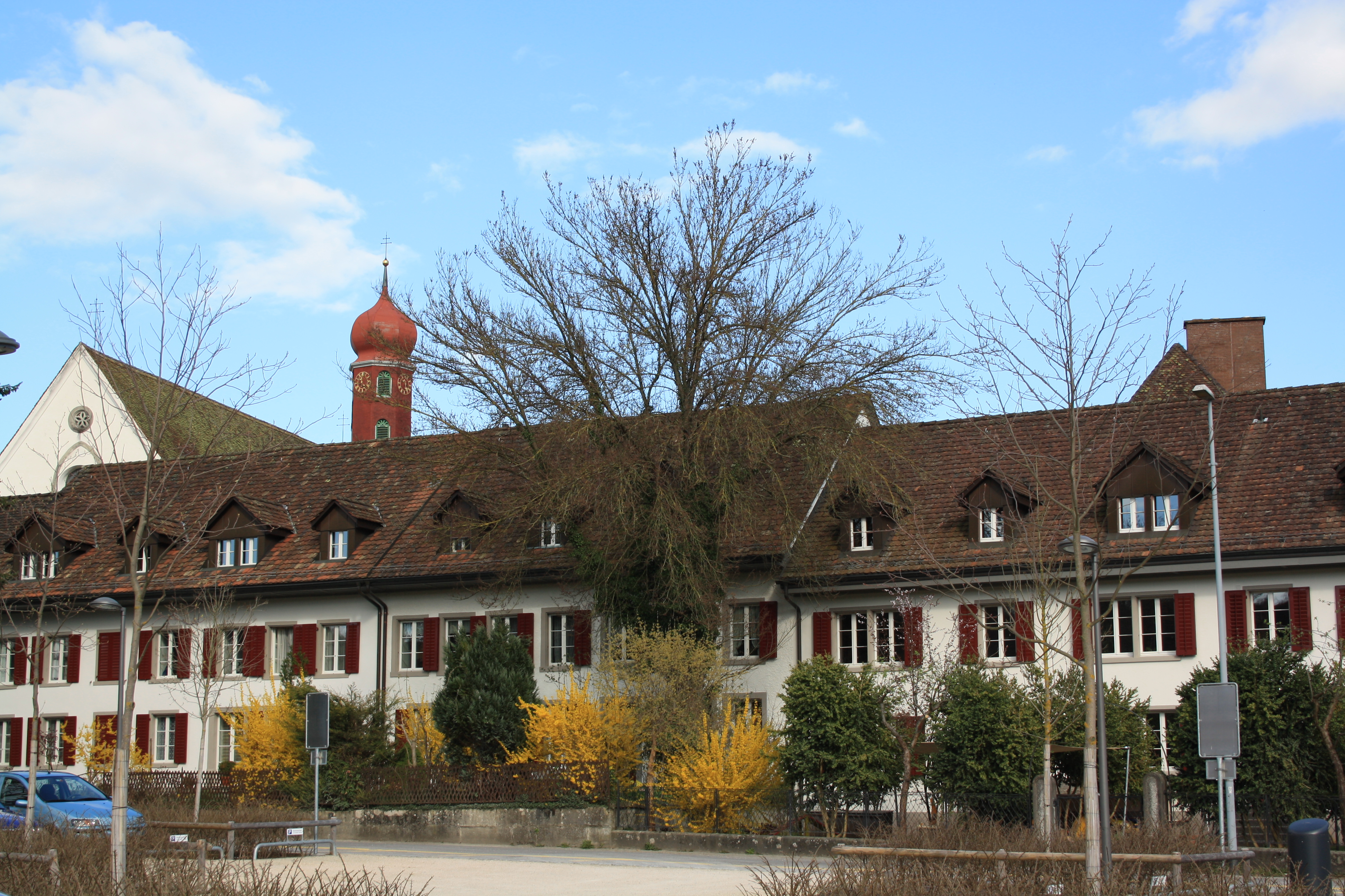 Häuser beim Kloster Wettingen